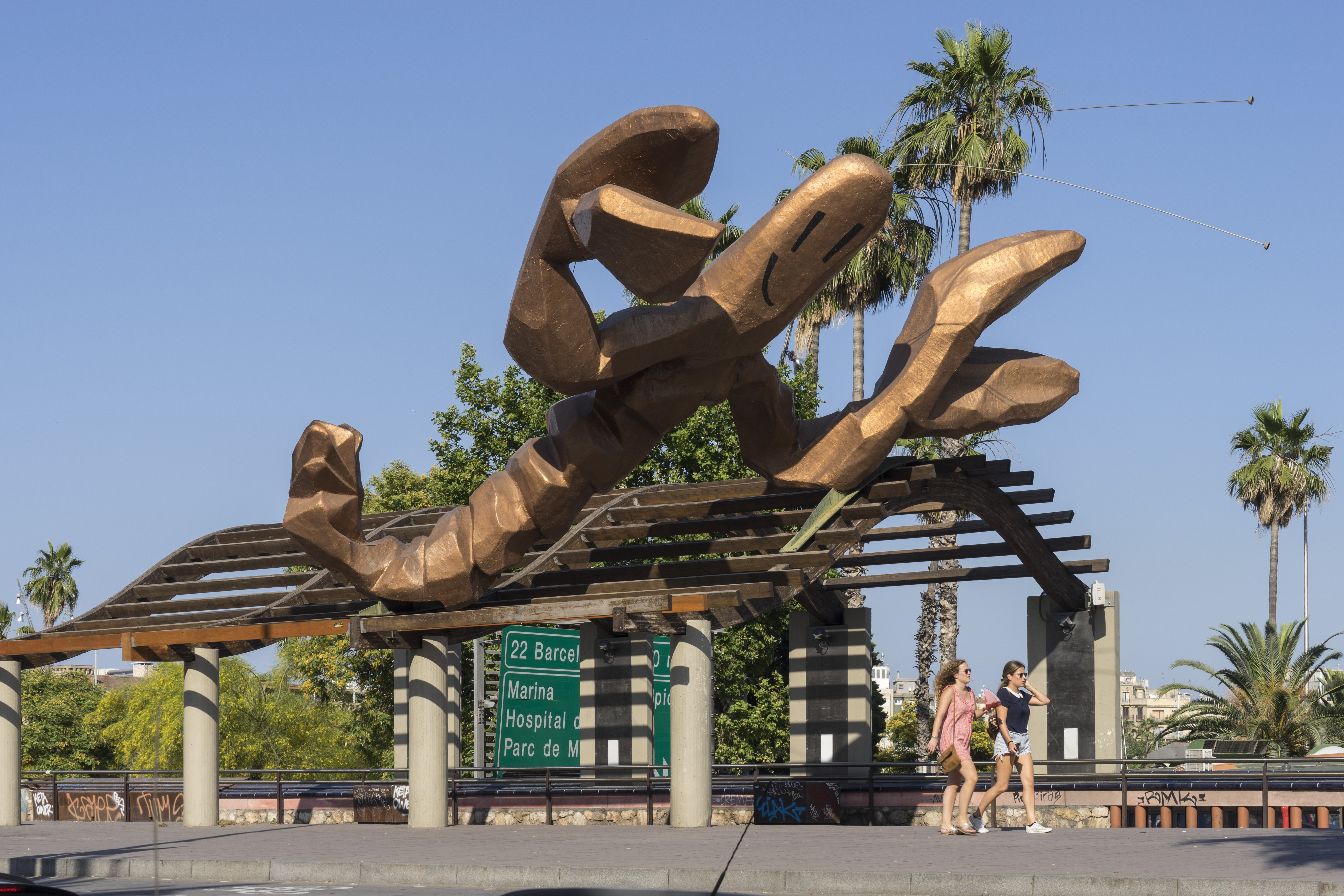 Die lachende Languste. Riesiger Lobster.